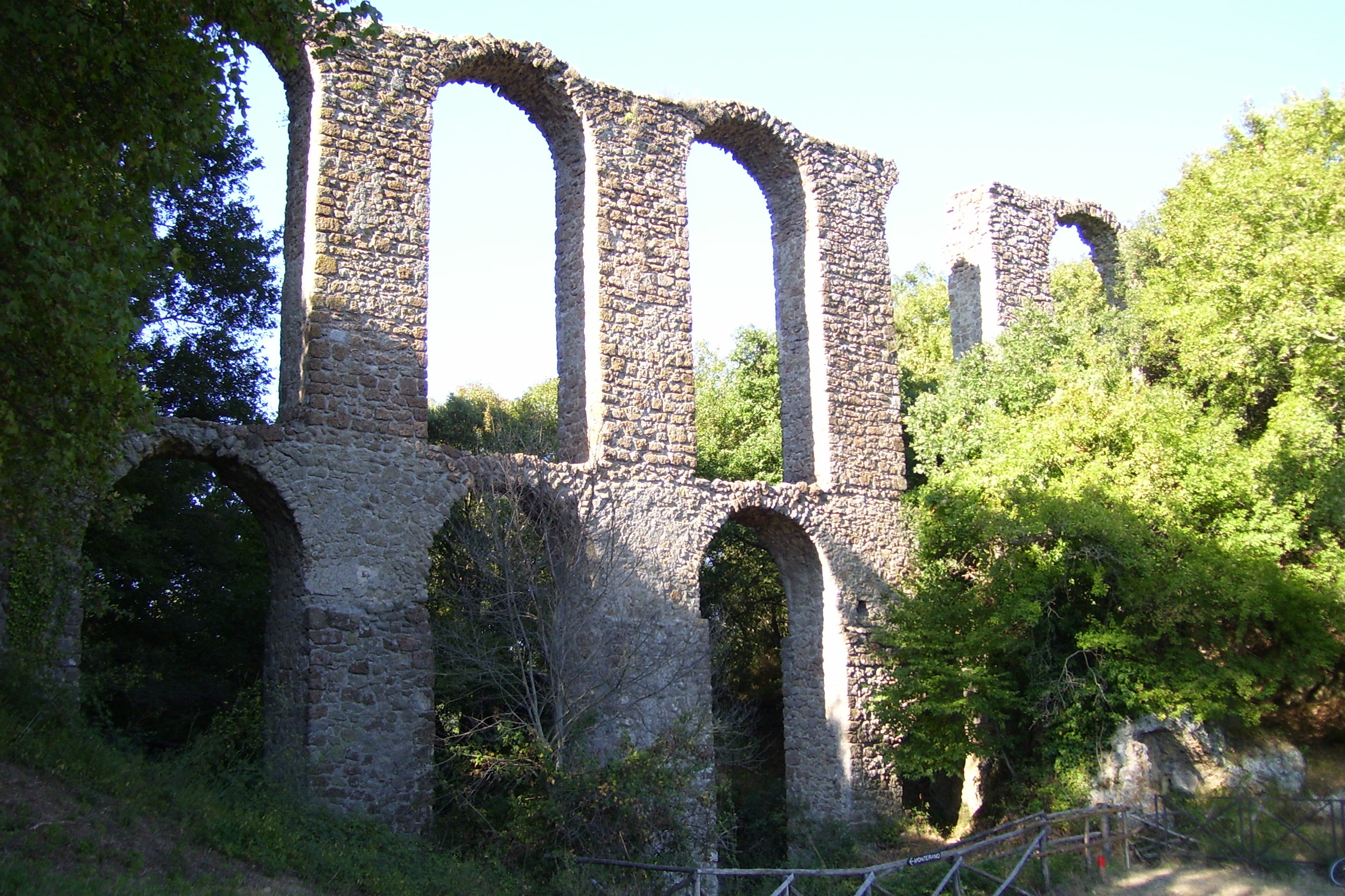 Aquädukt von Monterano.